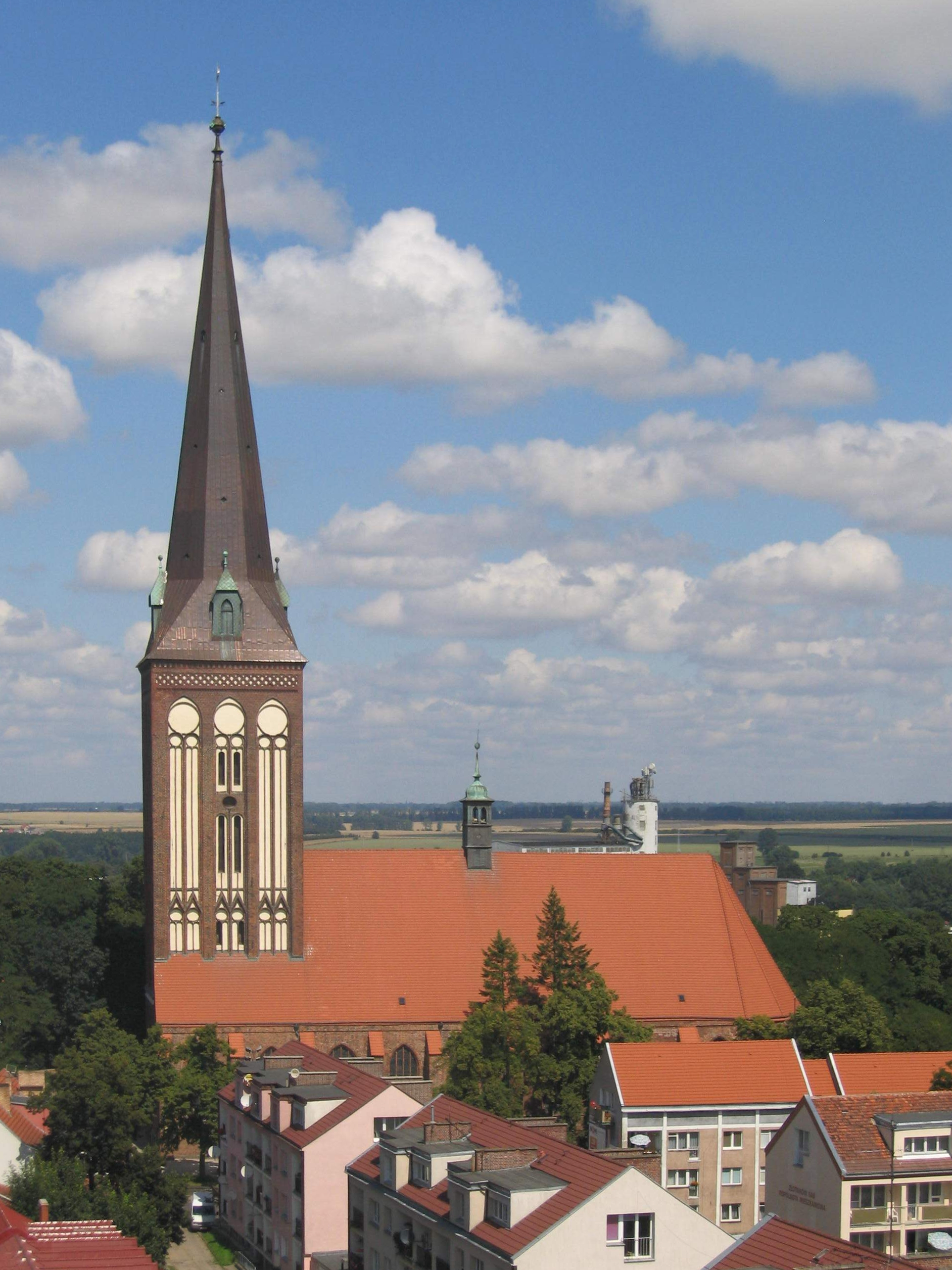 Kościół klasztorny Joannitów, ob. par. p.w. św. Jana Chrzciciela Stargard Szczeciński, ul. Chrobrego